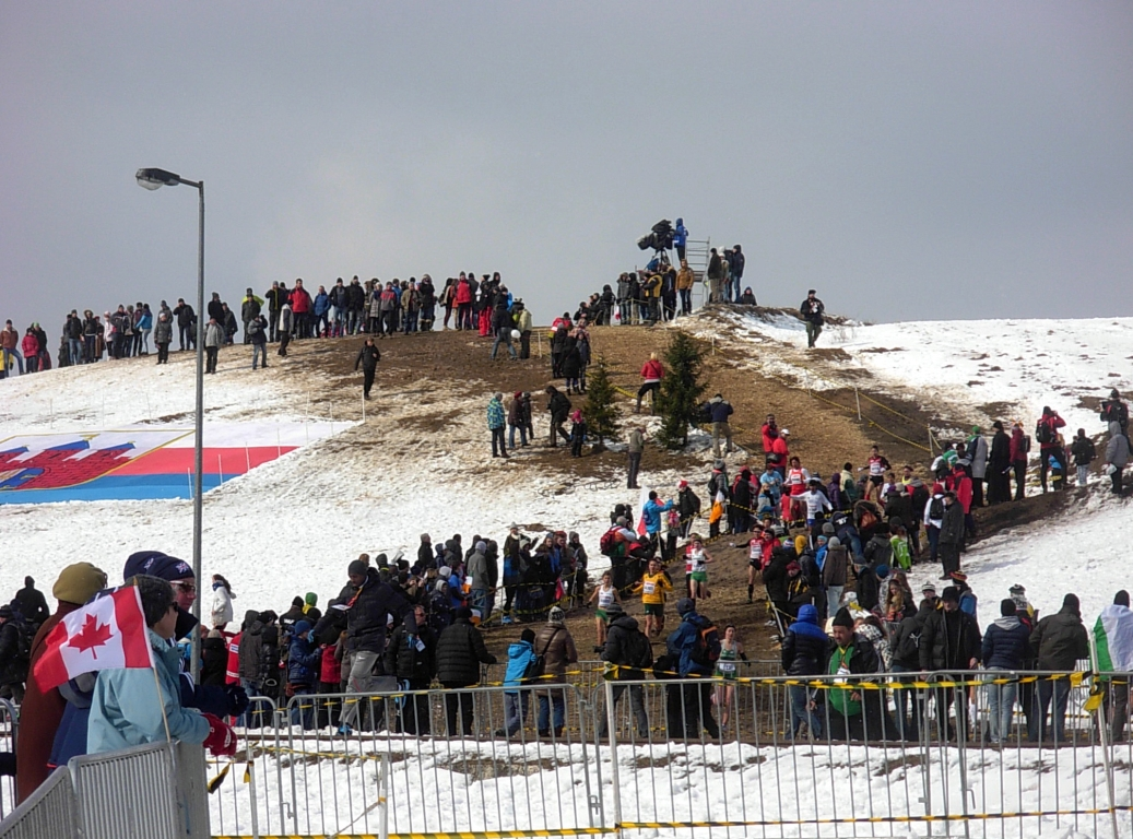 Mistrzostwa Świata w Biegach Przełajowych IAFF 2013 w Leśnym Parku Kultury i Wypoczynku Myślęcinek w Bydgoszczy